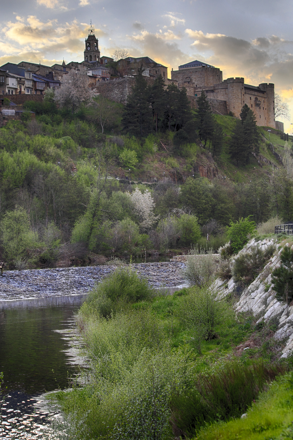 Puebla de Sanabria Provincia de Zamora Castilla y León España